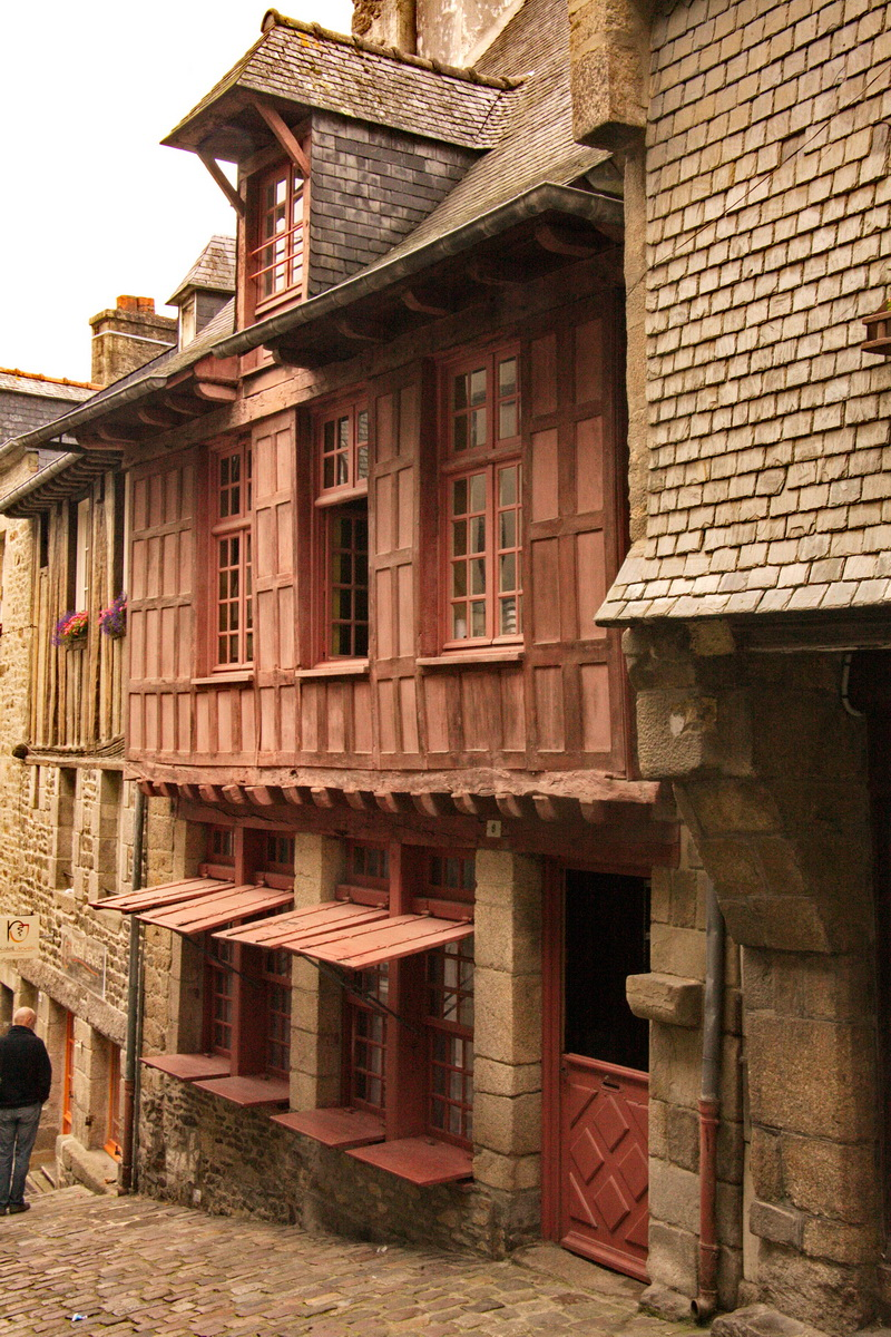 Maison (Classé) .